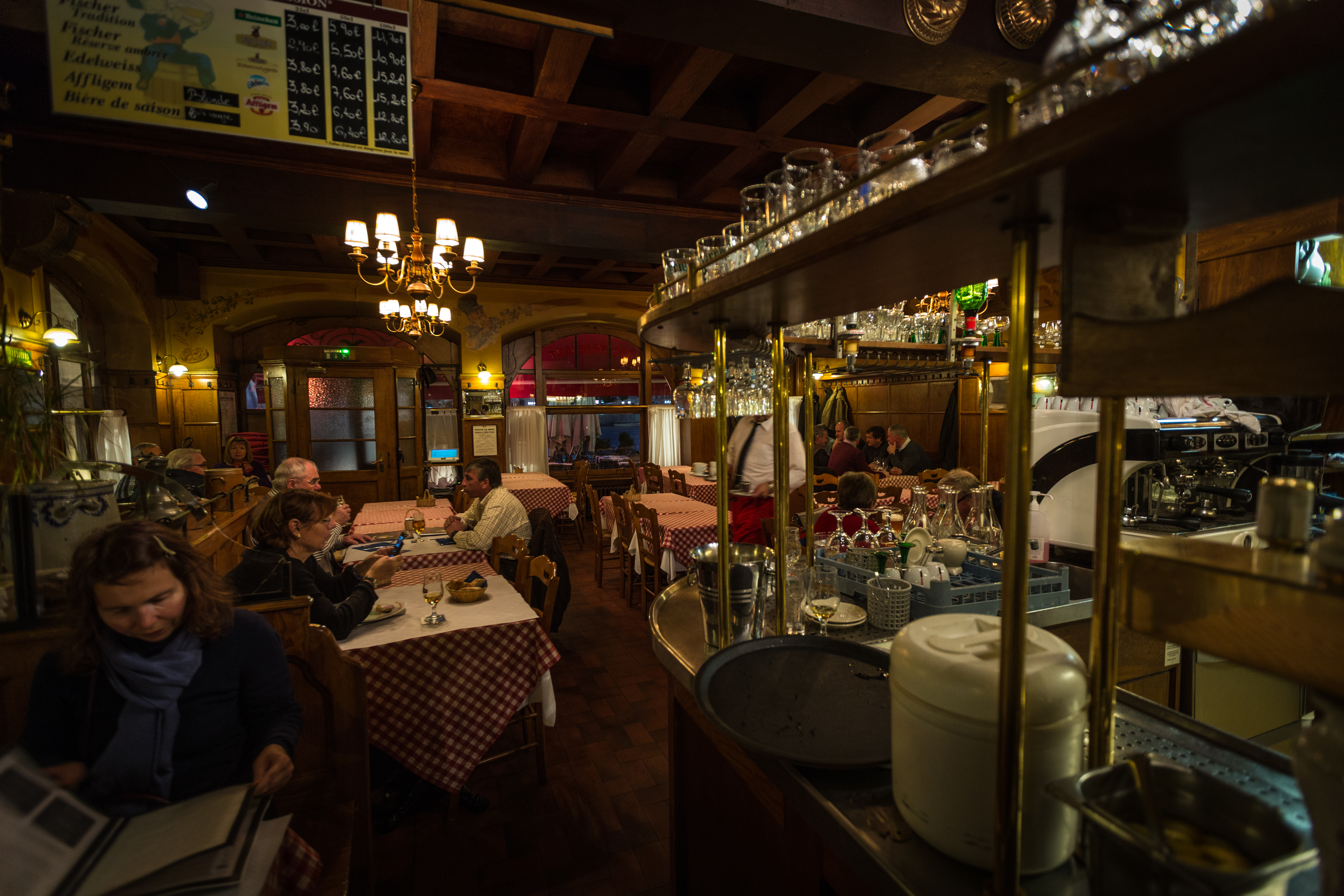 Strasbourg, place Gutenberg, Winstub Stadtwappe.